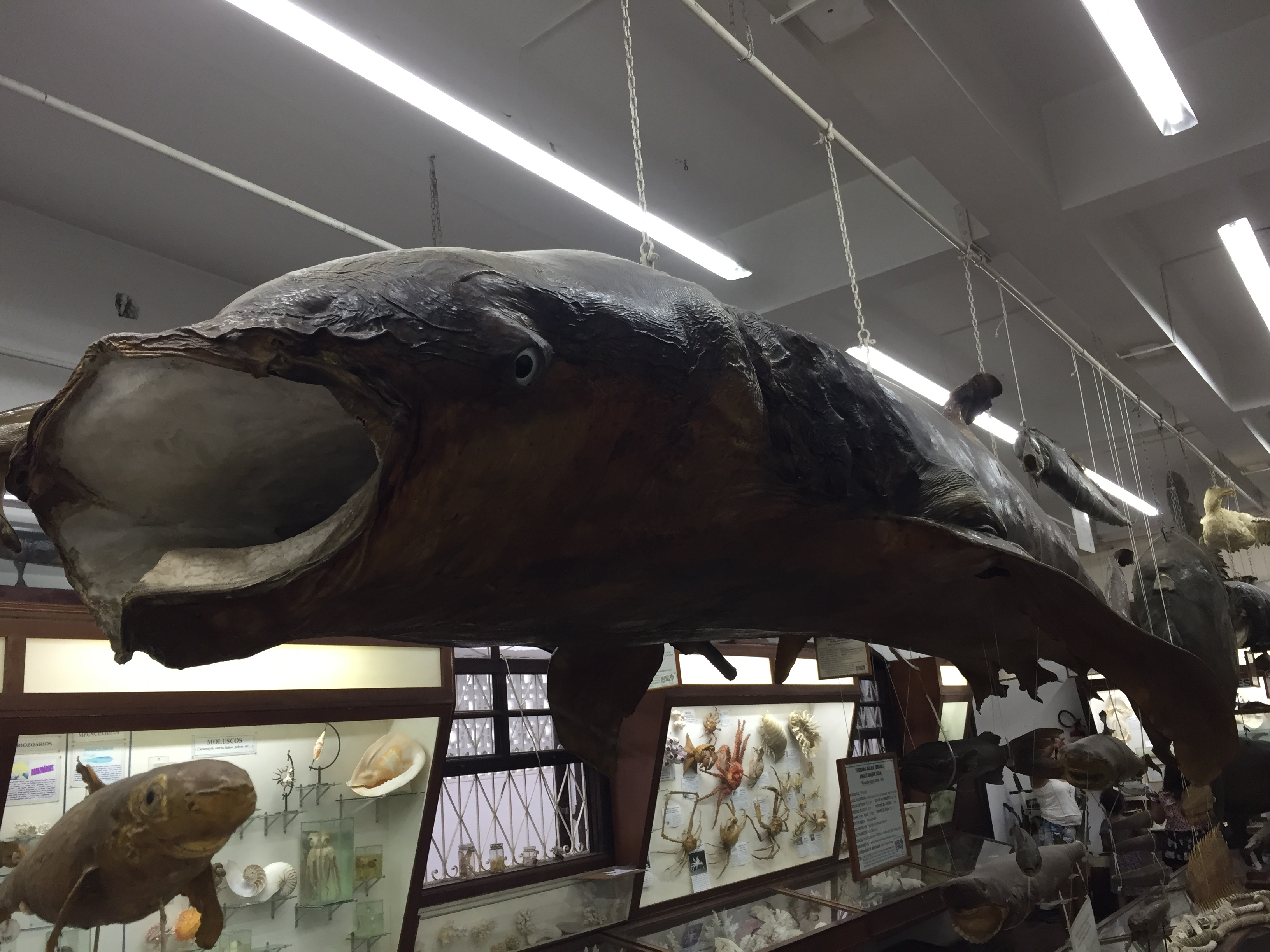 Tubarão baleia exposto no Museu do Mar (Santos)